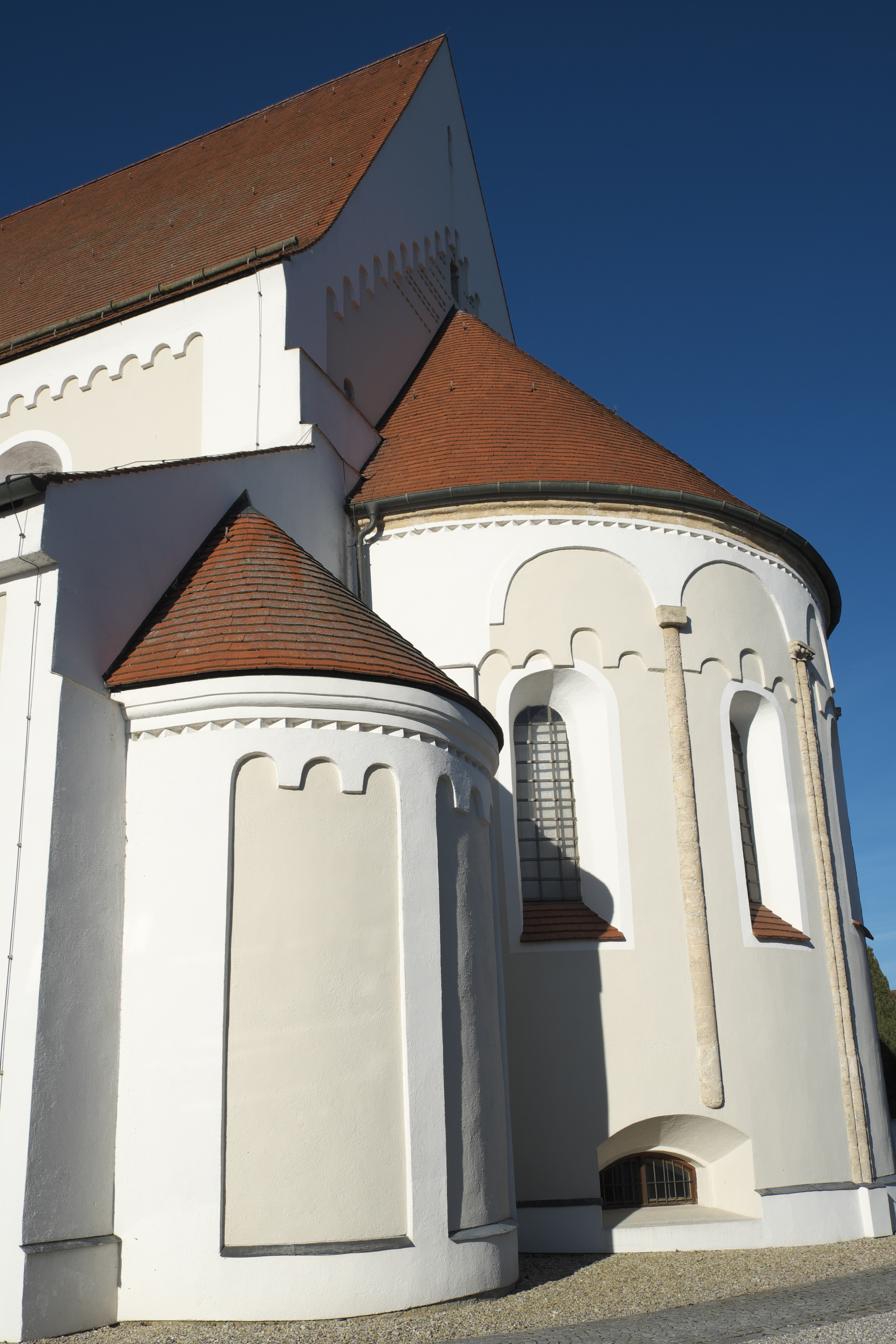 Katholische Pfarr-, ehemalige Kollegiatsstiftskirche St. Arsatius in Ilmmünster im Landkreis Pfaffenhofen an der Ilm (Bayern/Deutschland), romanische Apsis